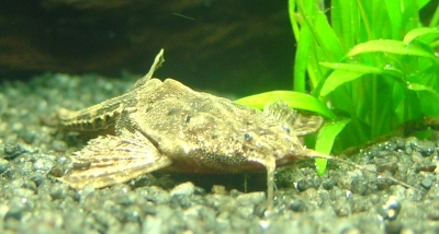 Bratpfannenwels